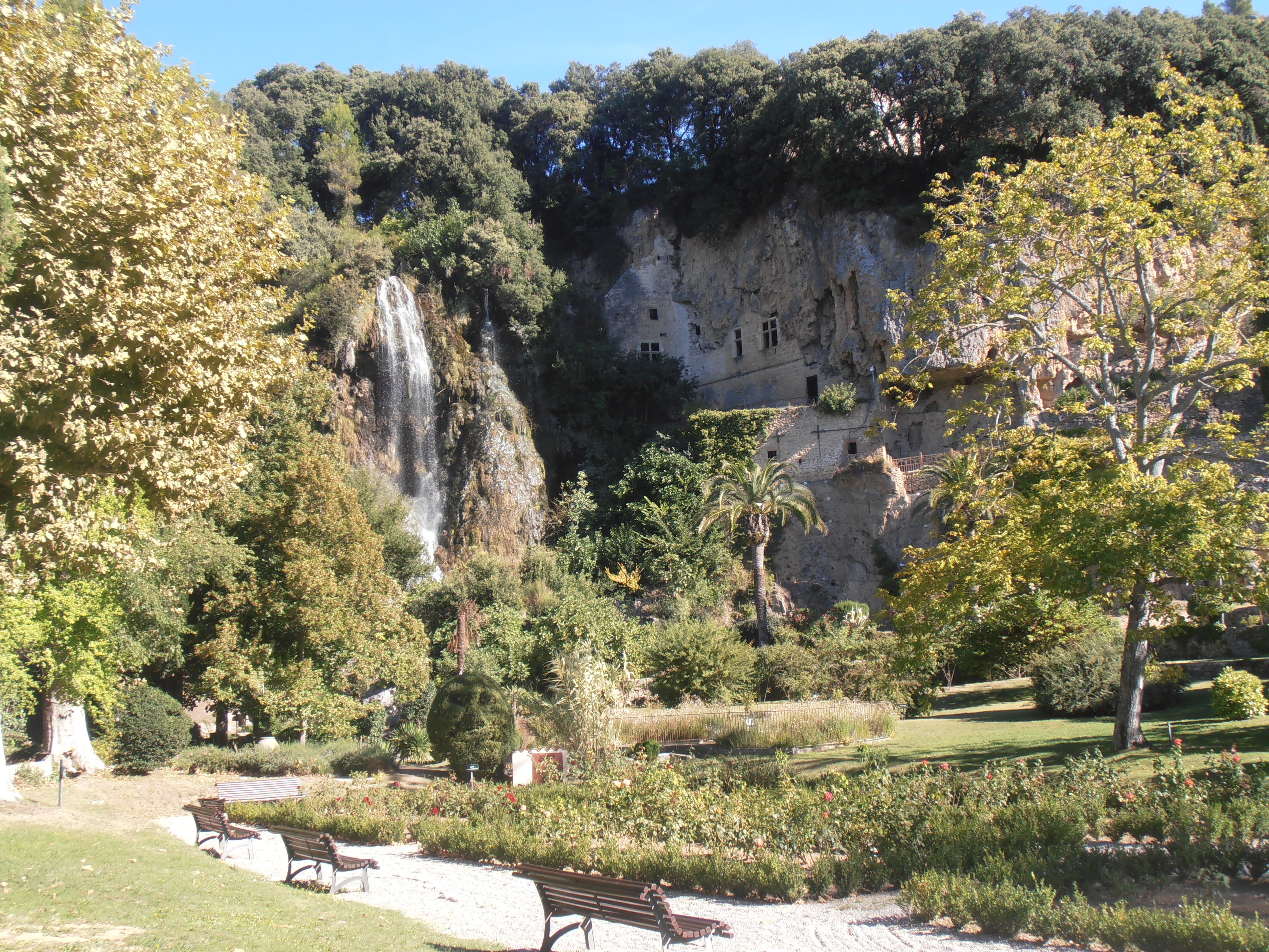 Var, Villecroze, la cascade et le parc municipal. Le parc a été créé en 1920 par un couple d'origine américaine. Il s'étend sur 2,5 hectares au pied des falaises dans lesquelles ont été aménagées les grottes troglodytiques avec ses fenêtres à meneaux.